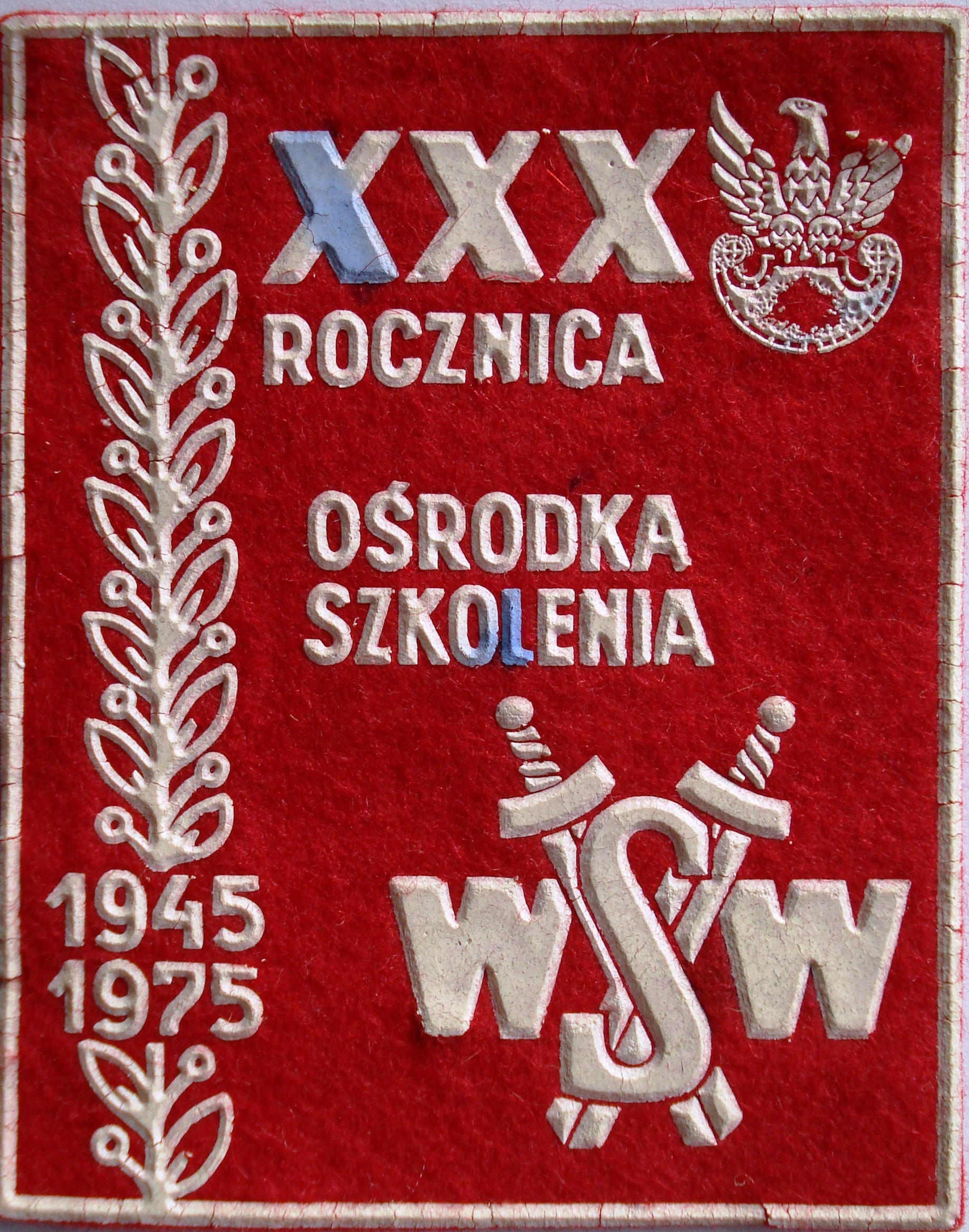 Dawny Ośrodek Szkolenia Wojskowej Służby Wewnętrznej im. Feliksa Dzierżyńskiego w Mińsku Mazowieckim. Plakietka wydana w XXX rocznicę powstania.